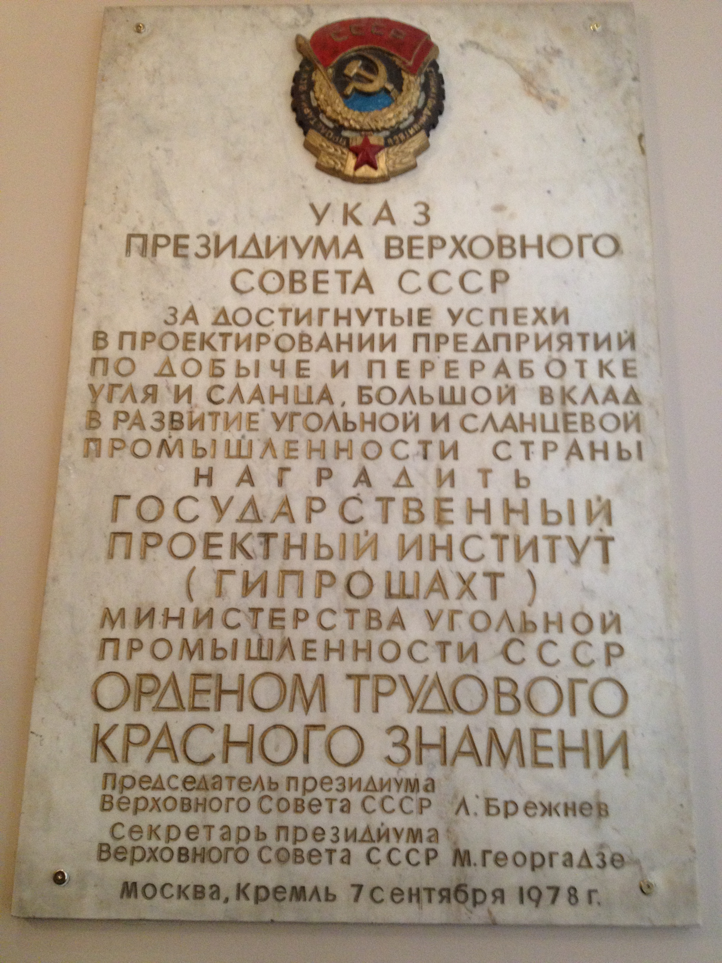 Указ о награждении